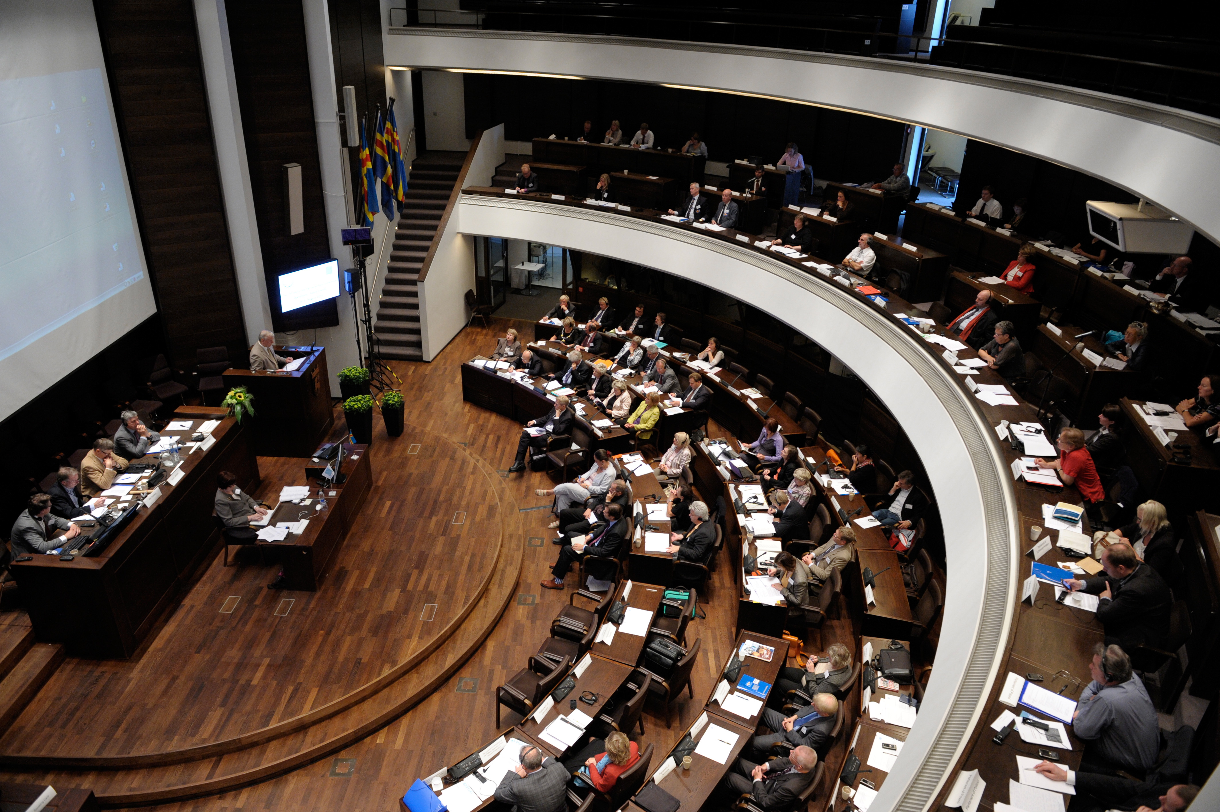 BSPC 19 Mariehamn Åland 2010